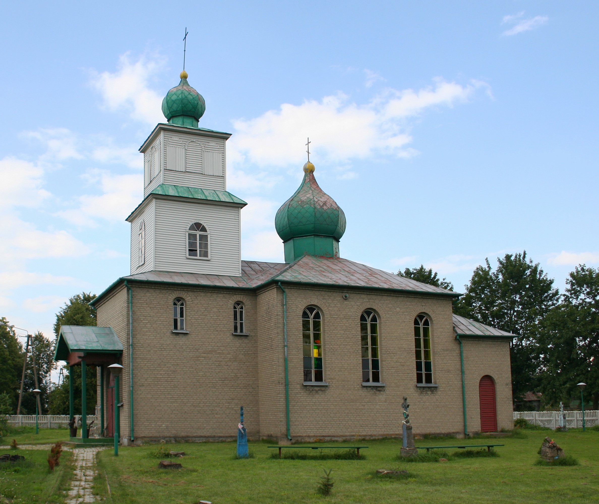 Cerkiew w miejscowości Sasiny, gmina Boćki, woj. podlaskie